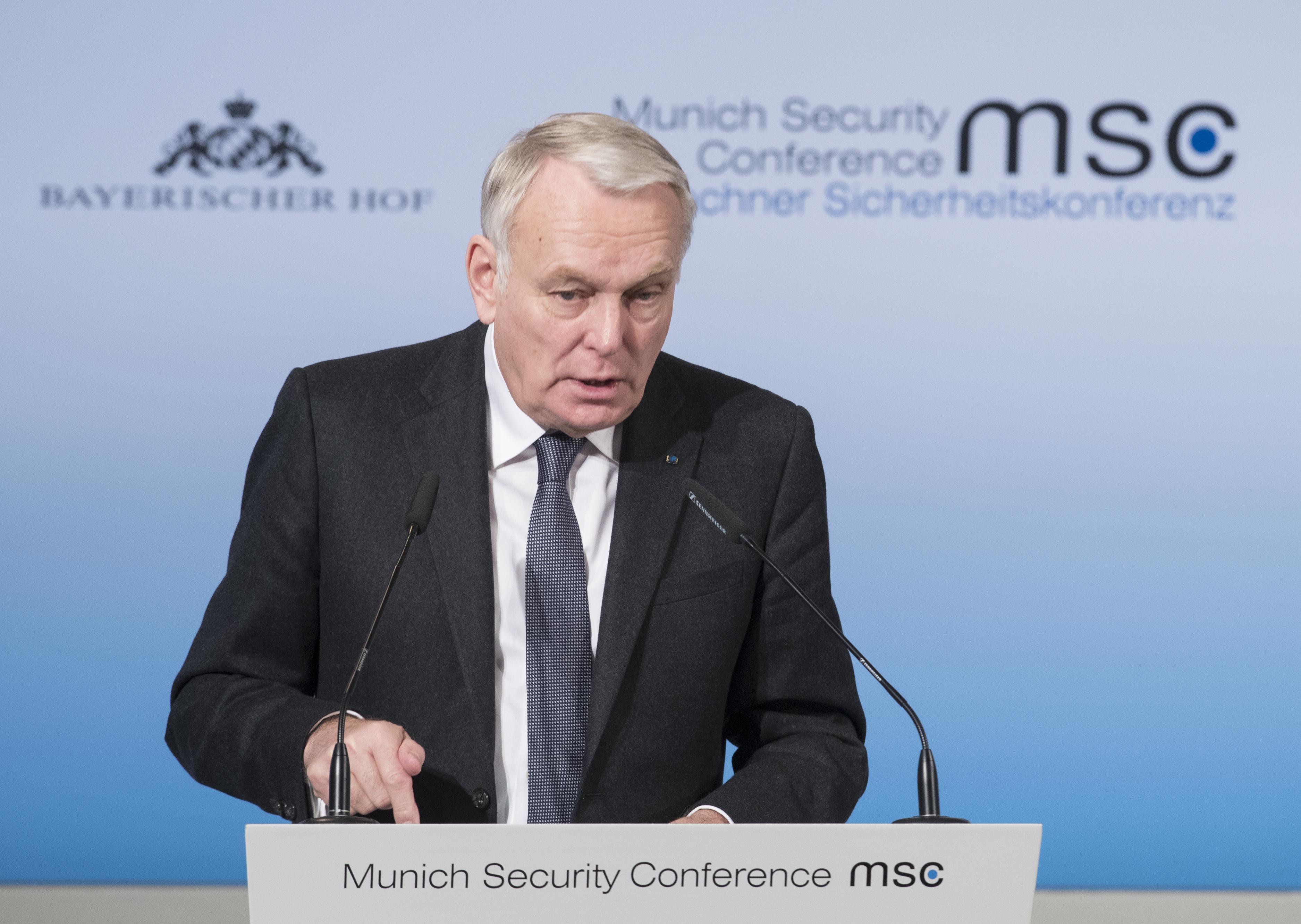 Jean-Marc Ayrault während der Münchner Sicherheitskonferenz 2017